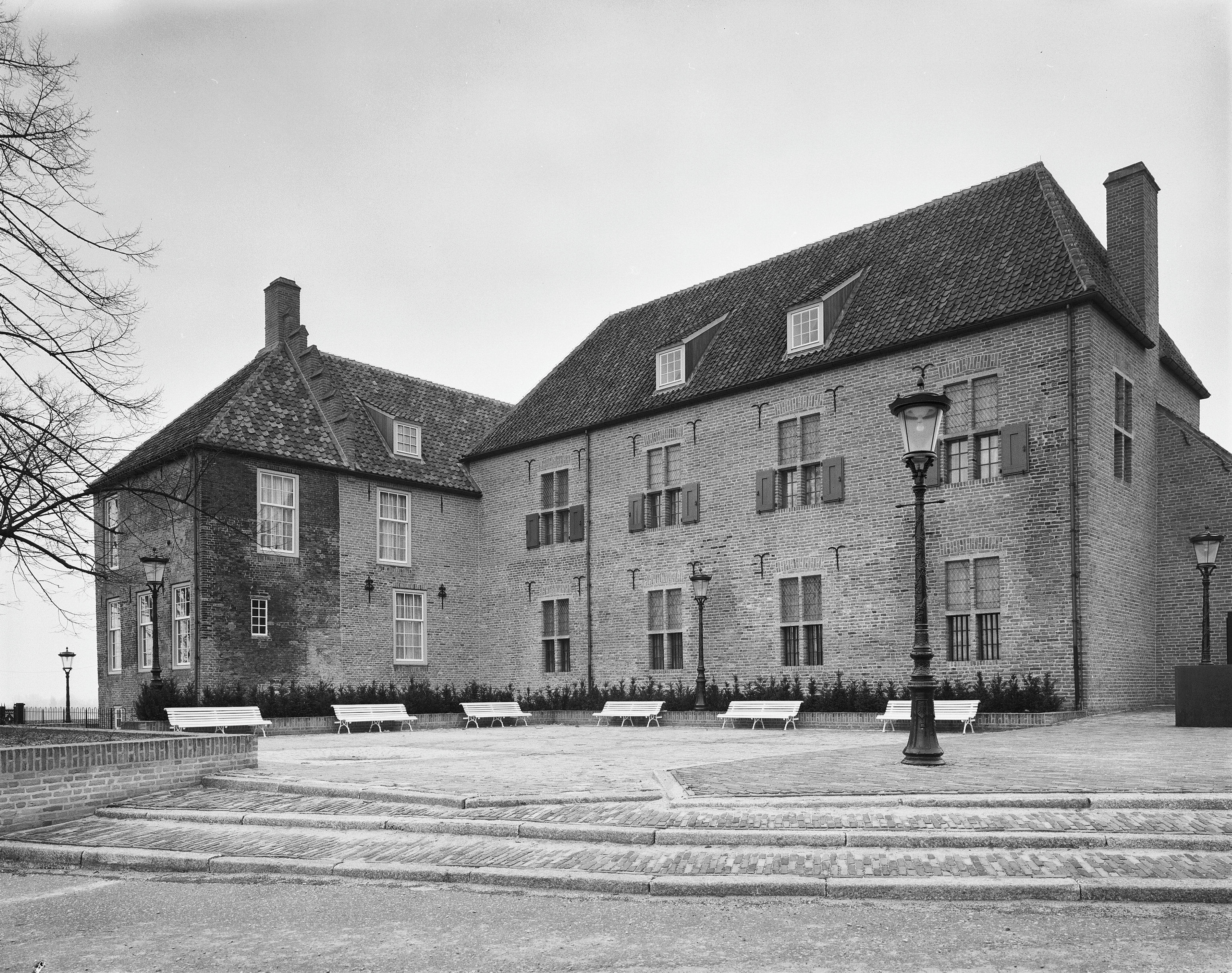 Commanderij van Sint Jan: achtergevel